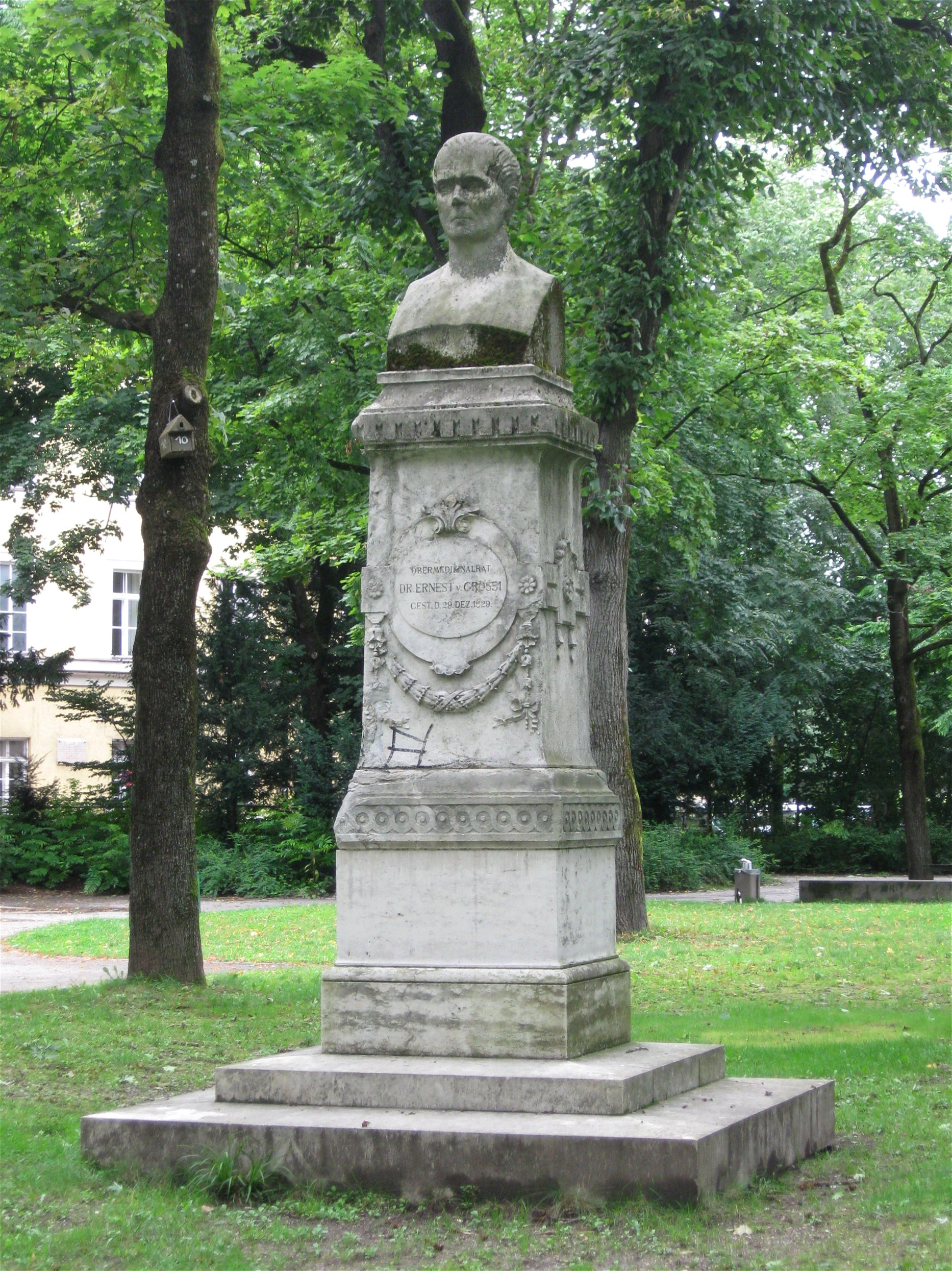 Denkmal für Ernest von Grossi, Büste 1831 von Ludwig Michael Schwanthaler, Nußbaumanlagen, München